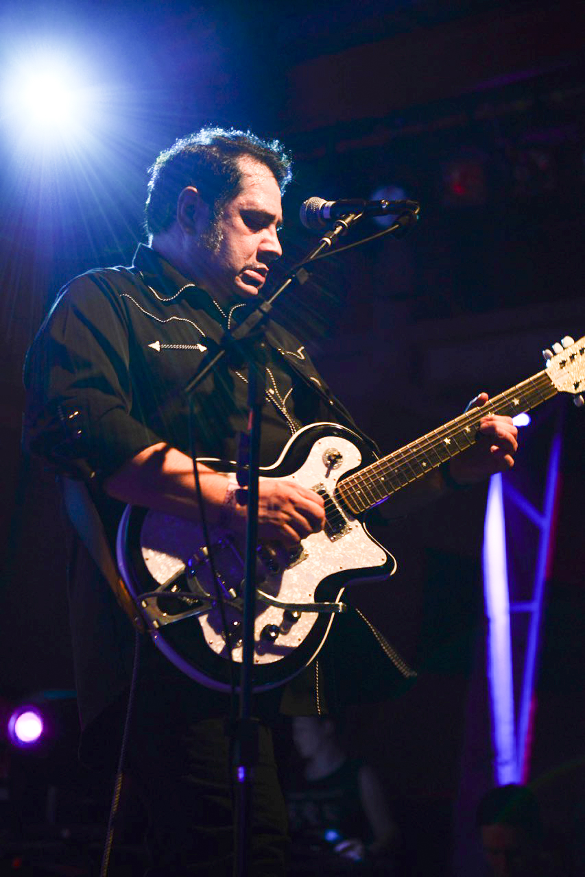 Zé Antonio Algodoal - Pin Ups (Sesc Pompeia, Nov. 2015)